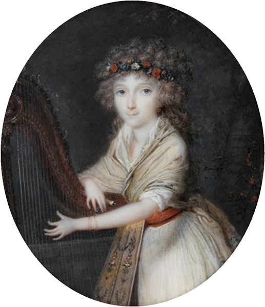 Portrait of Adélaïde d'Orléans